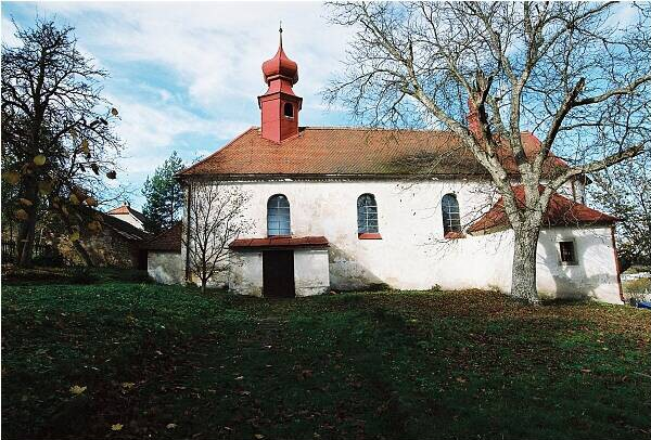 Fotografie z obce Olšany